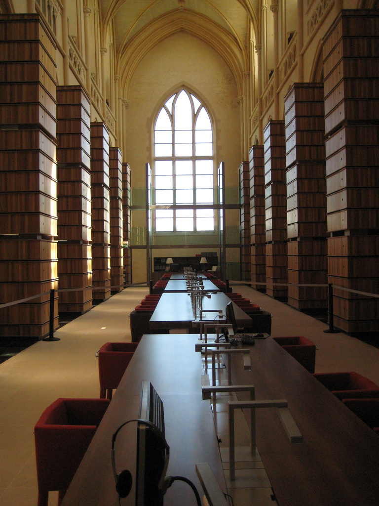 Bibliothèque de l'IMEC, aménagée dans l'ancienne abbatiale de l'abbaye d'Ardenne (14)